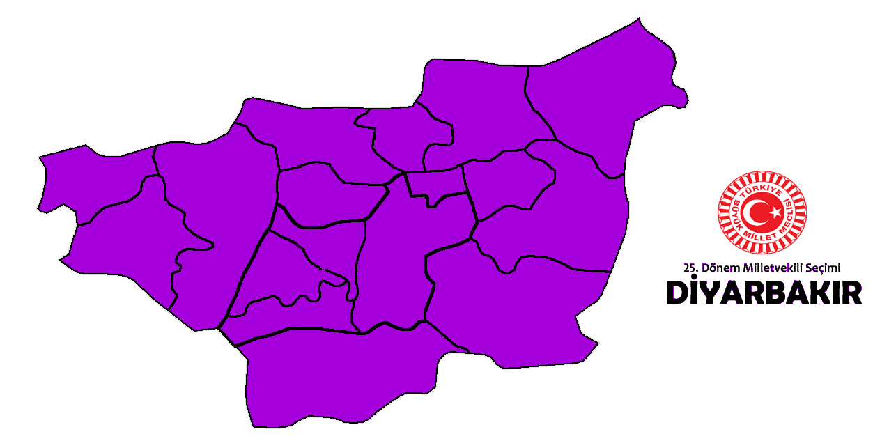 2015 genel seçim sonuçları